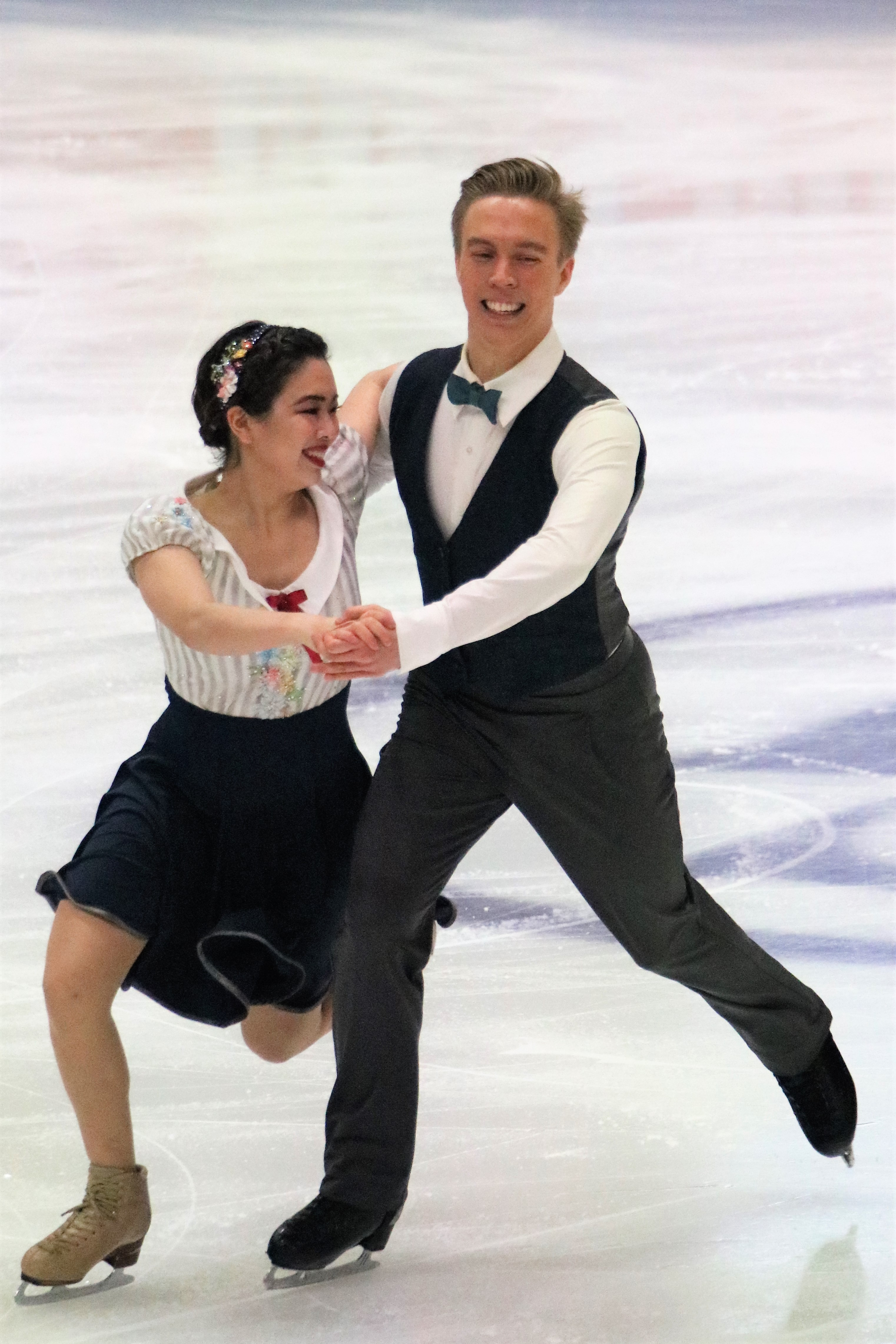 Юка Орихара и Юхо Пиринен (Финляндия) на чемпионате Европы по фигурному катанию 2020